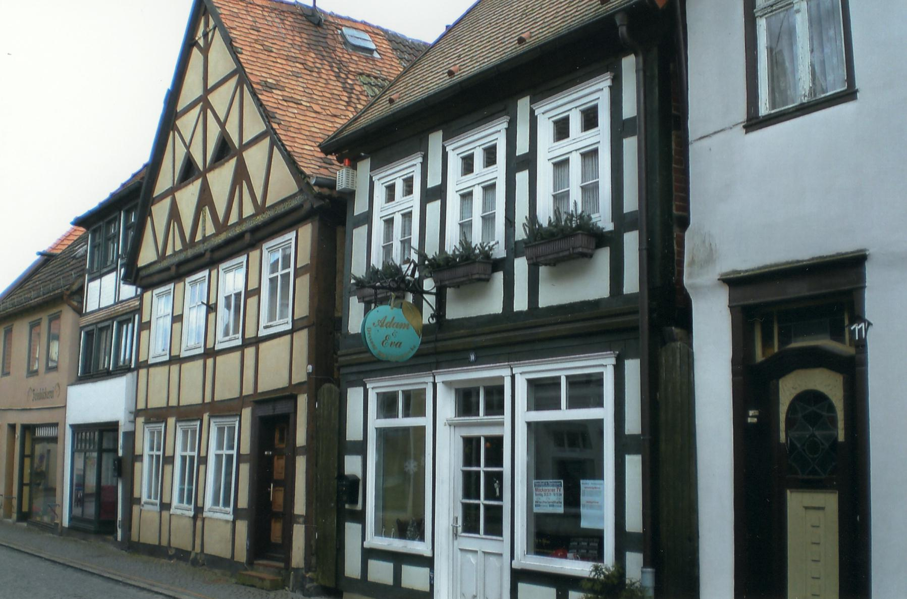 Denkmalgeschütztes Fachwerkhaus Schwibbogen 9 (links) von 1665 in Seehausen.